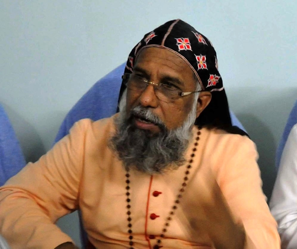 Kardinal-Großerzbischof Mar Baselios Cleemis Thottunkal beim Besuch in einer Pfarrei, Indien, Kerala